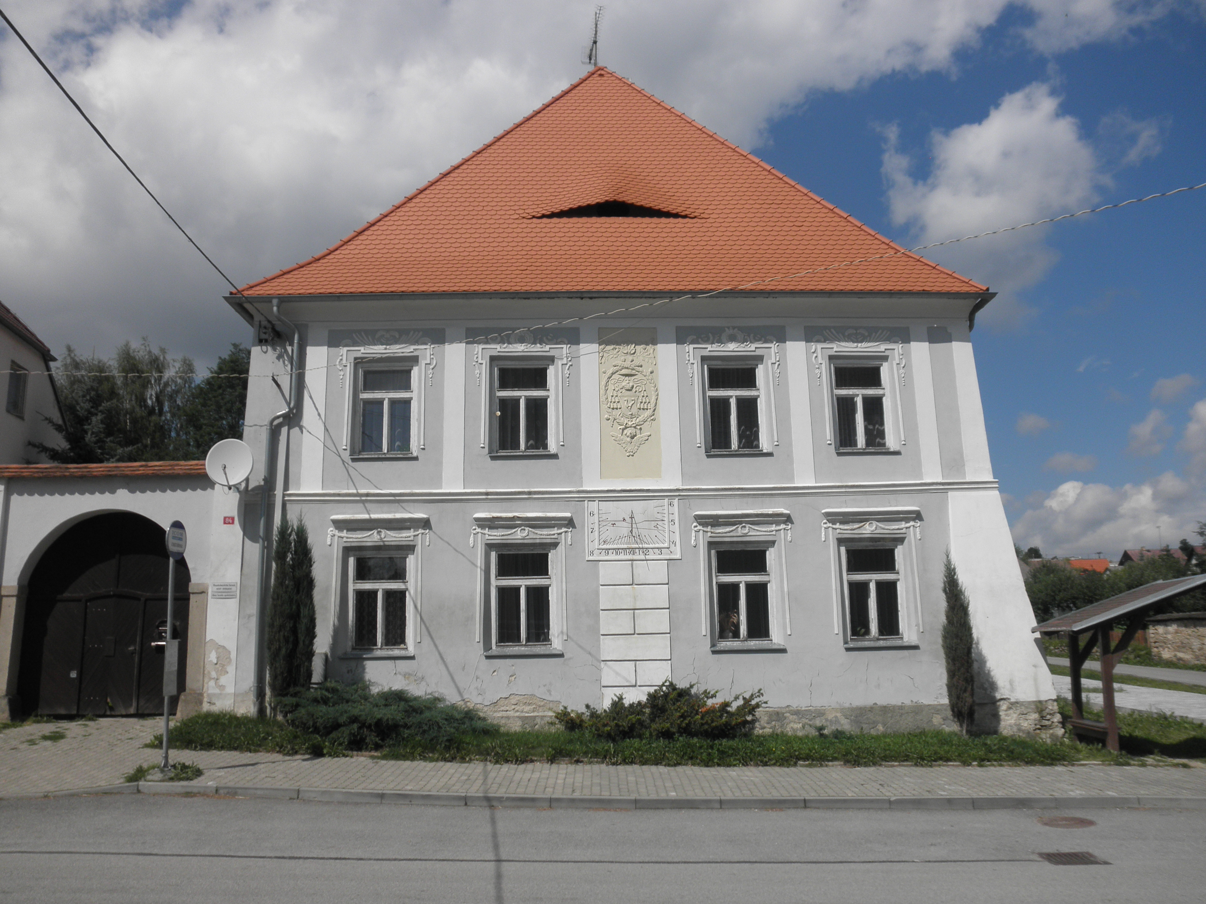 Fara, Nový Rychnov 84